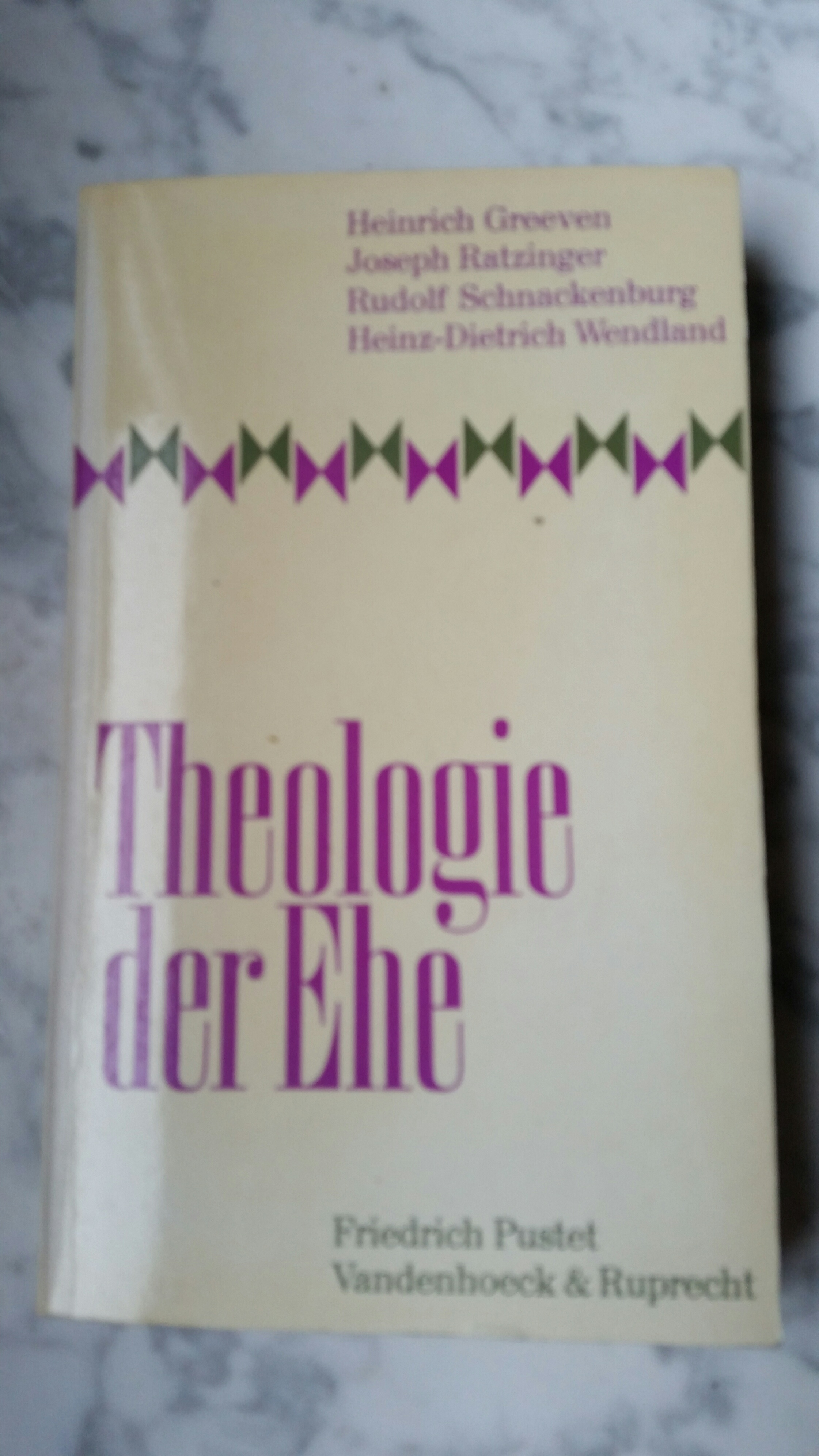 Das Buch "Theologie der Ehe" war 1969 eine der ersten Veröffentlichungen des Ökumenischer Arbeitskreis katholischer und evangelischer Theologen (ÖAK) zu einer der vor der Öffentlichkeit weitgehend verborgenen Tagungen des ÖAK.